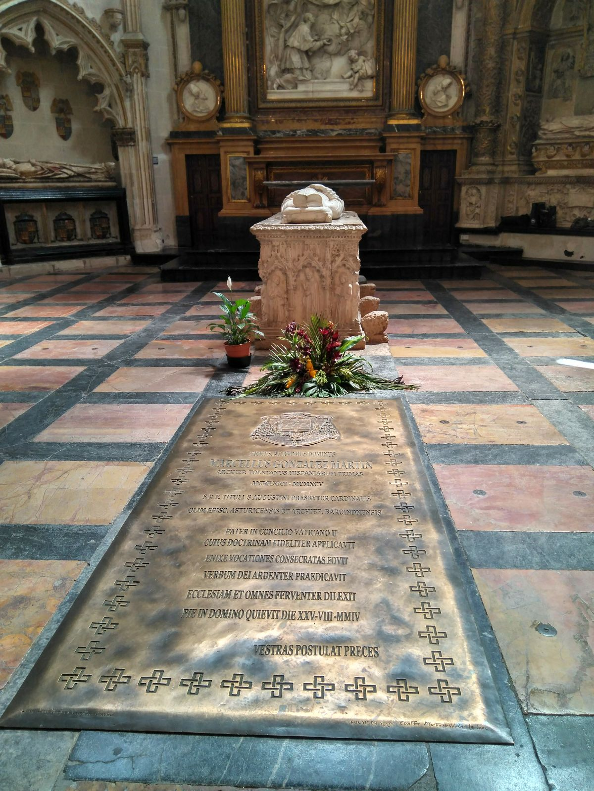 Tumba del cardenal Marcelo González Martín, arzobispo primado de Toledo (1918-2004)